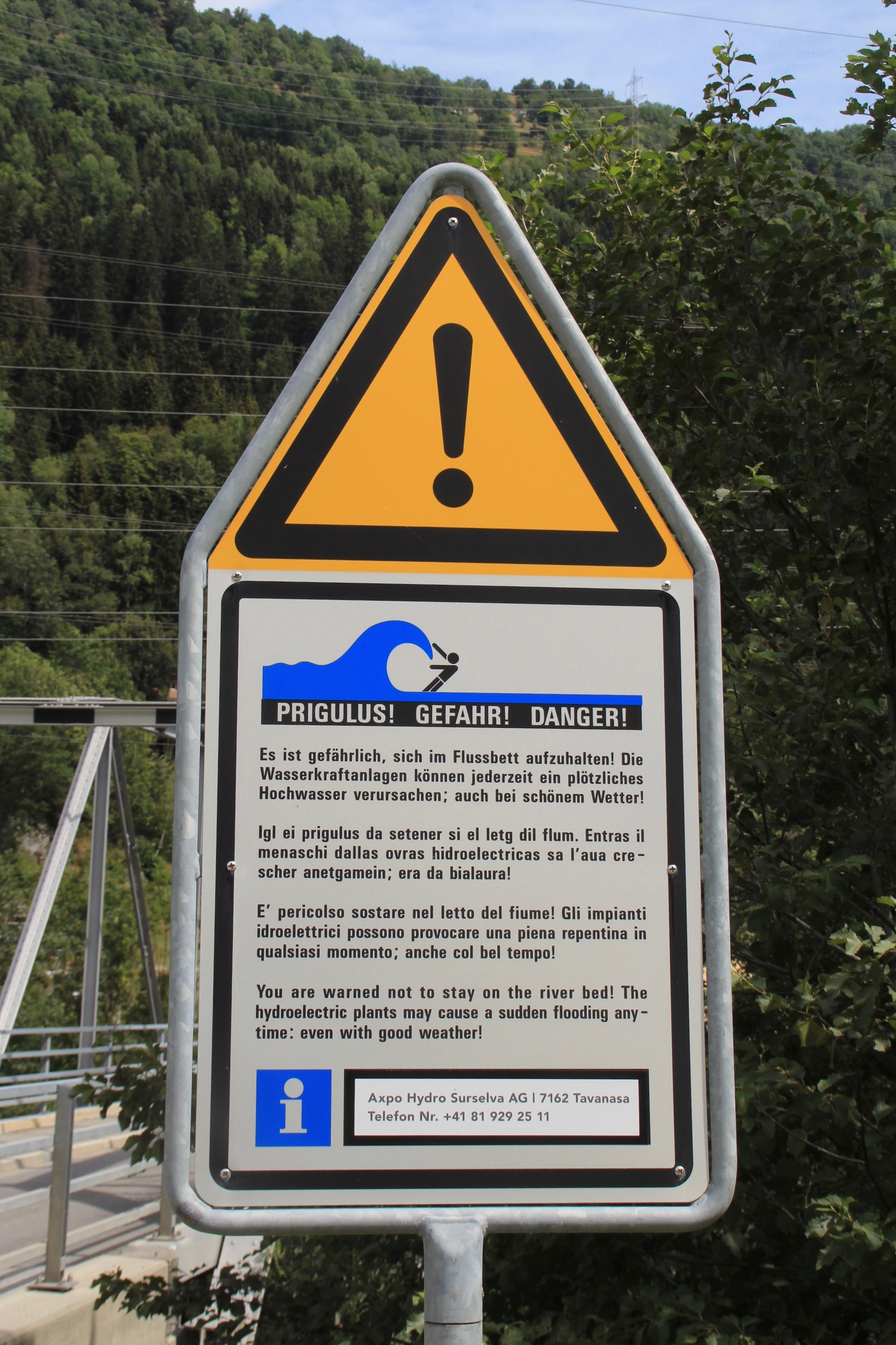 Warnschild vor Schwallwasser am Vorderrhein in Tavanasa.